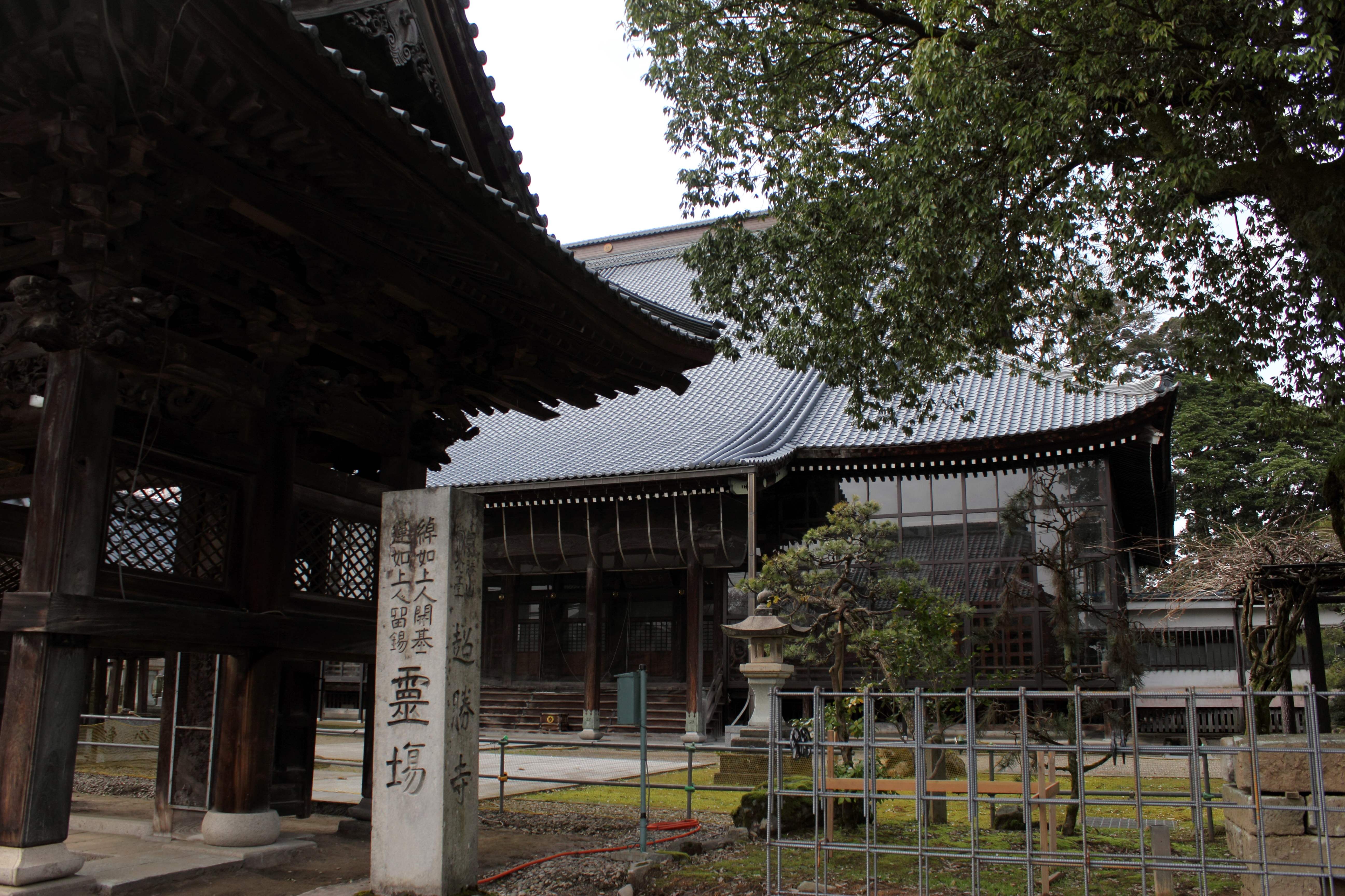 西超勝寺(浄土真宗本願寺派)